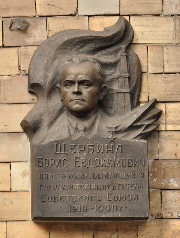 Барельеф в честь Б.Щербины на стене Школы искусств в г.Дебальцево Донецкой области Украины